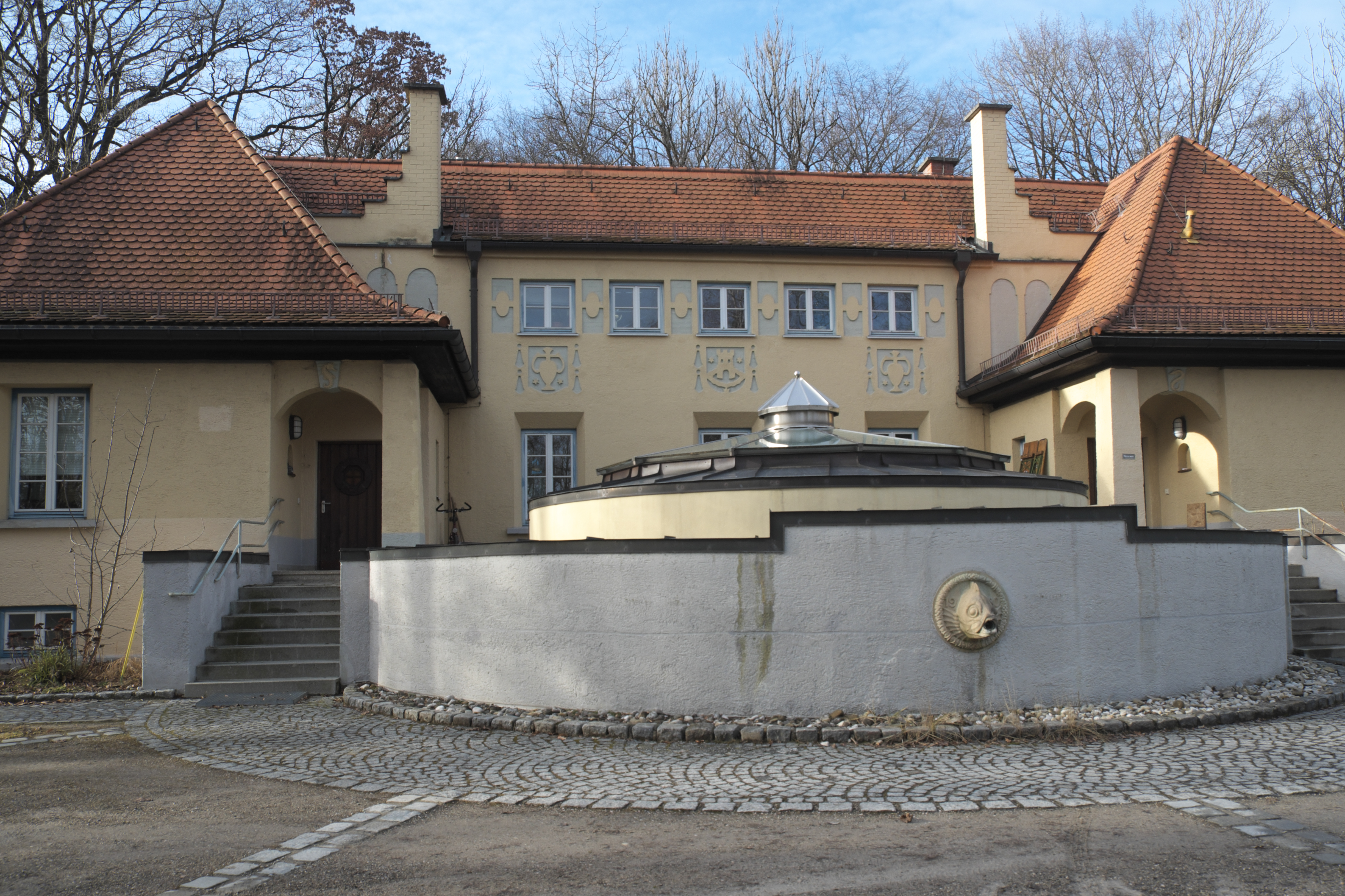 Wasserwerk Pasing, Planegger Straße 150, in Pasing im Stadtbezirk Pasing-Obermenzing in München (Bayern/Deutschland)